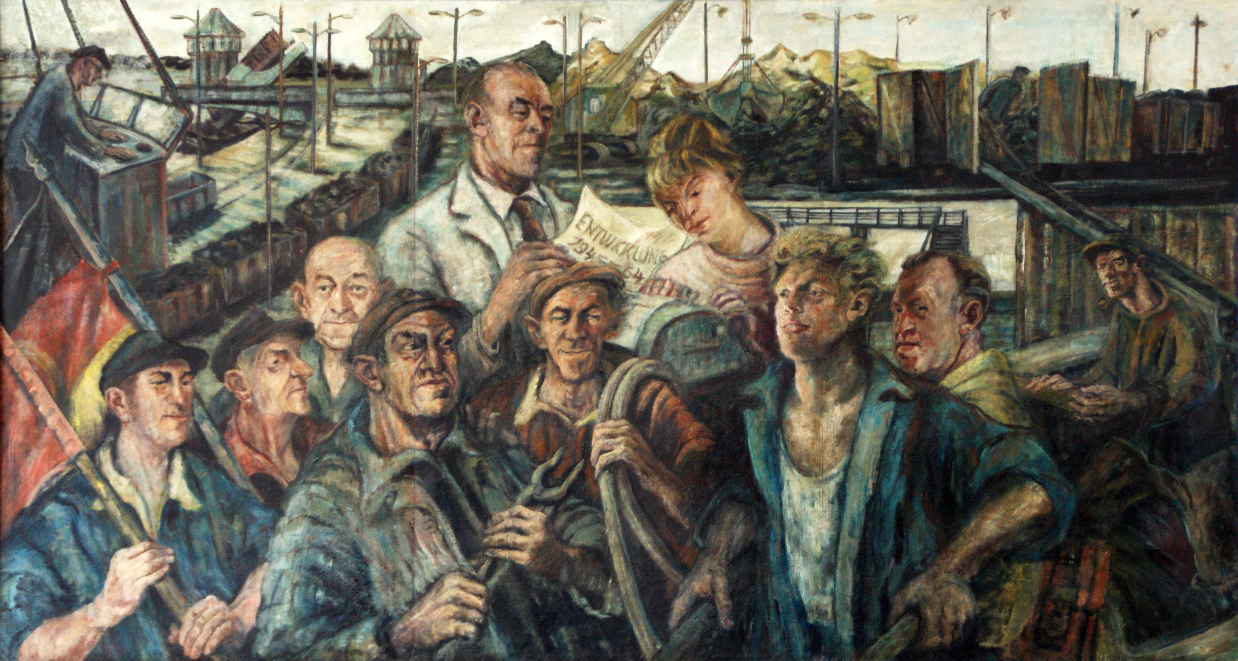 Das Bild wurde anlässlich eines sehr strengen Winters ca. 1962 von der damaligen Hafen-Verwaltung (dortige Gewerkschaft?) bei der Künstlerin in Auftrag gegeben. Die abgebildeten Personen sind "Best-Arbeiter", die in einem ca. 1-jährigen Prozess des Porträtierens durch die Künstlerin gemalt wurden. Es ist gerahmt, die Maße sind 3,70m x 2m